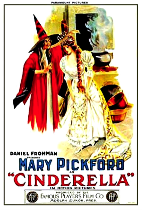 Affiche du film Cendrillon (1914) (Cinderella)